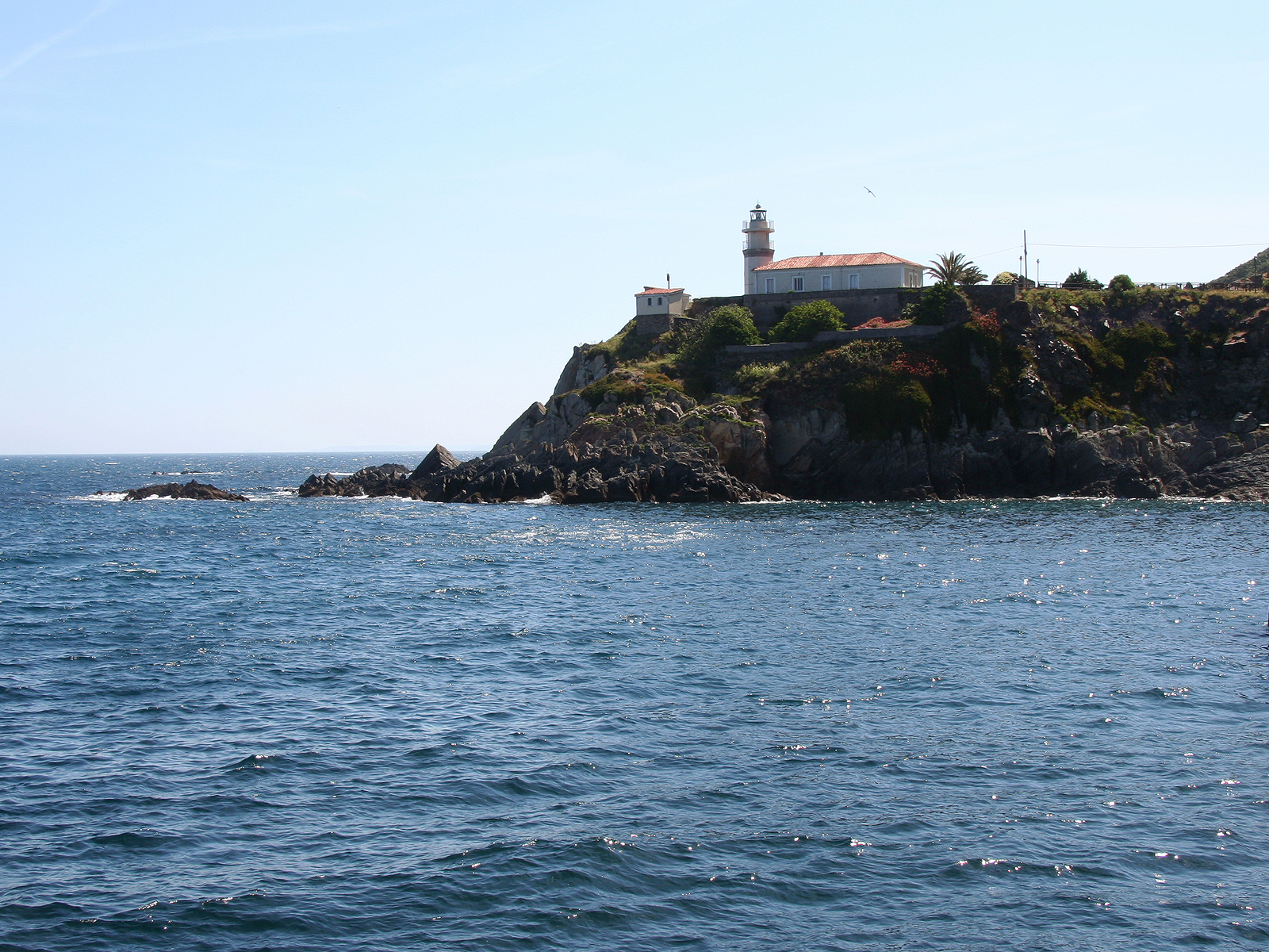 Faro de Cudillero Autor: Ramón Noriega